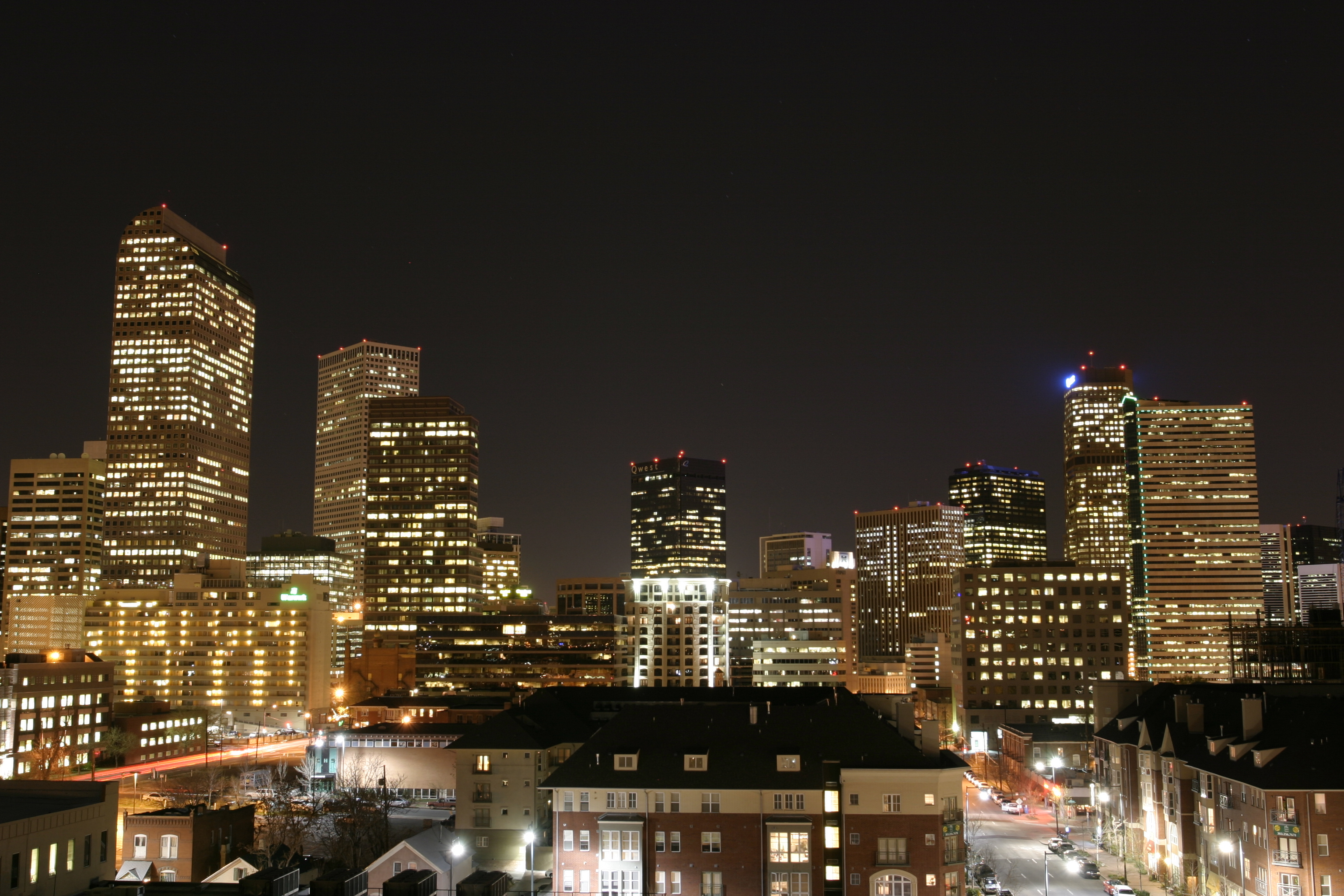 Denver skyline at night